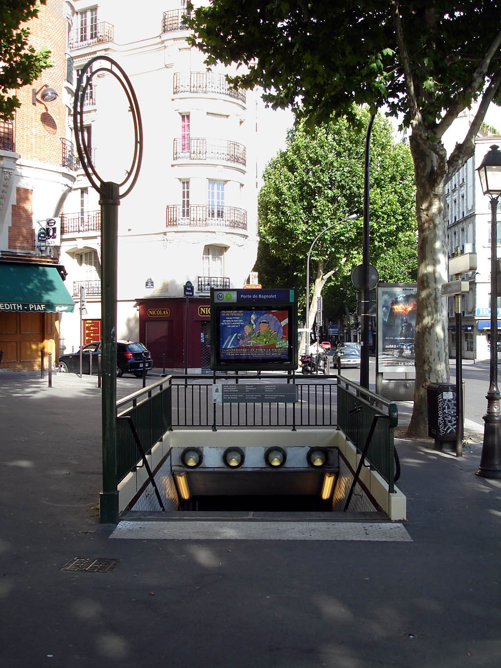 Entrée de la station Porte de Bagnolet de la ligne 3 du métro de Paris, France